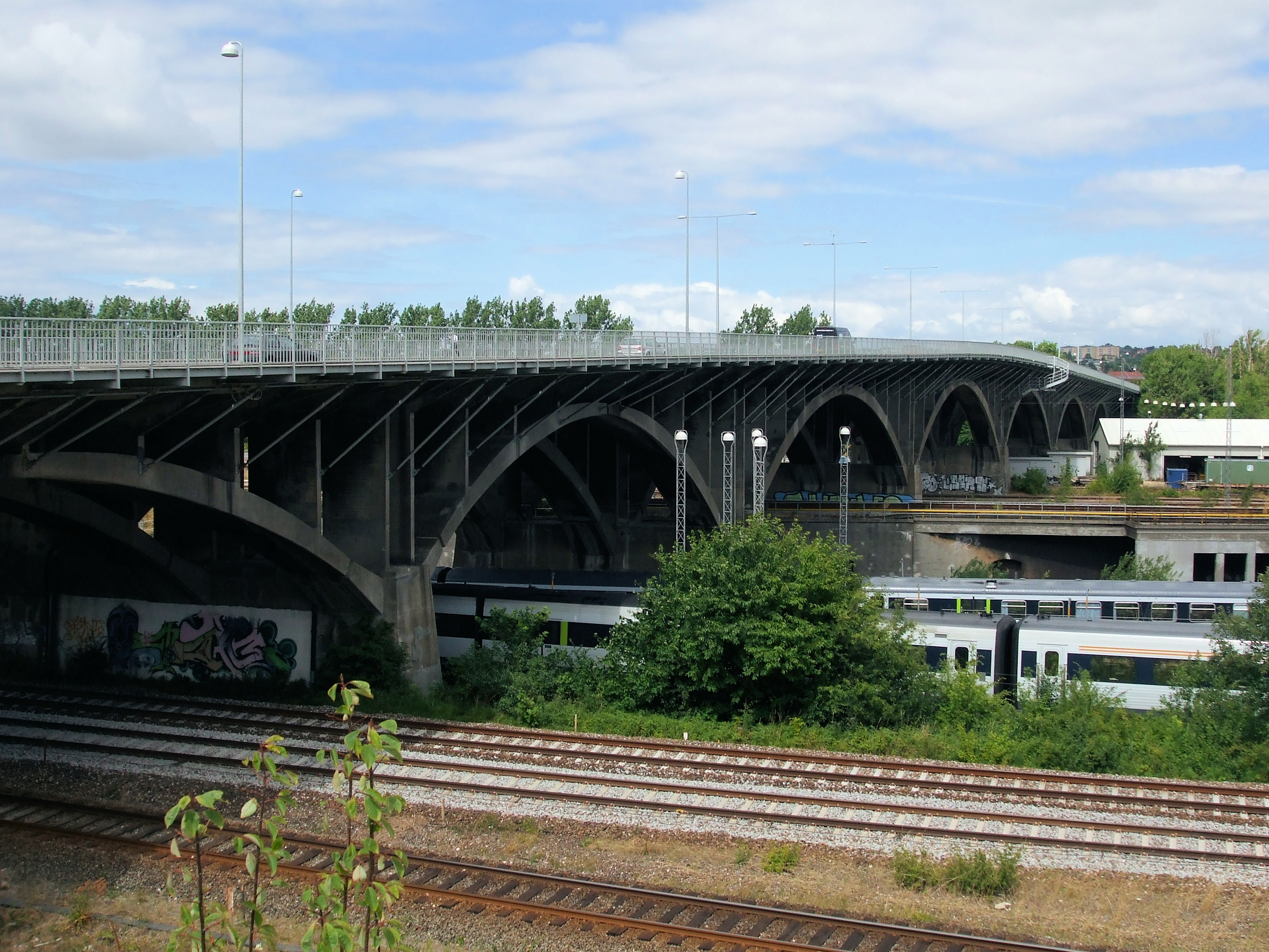 Århus Ringgadebro